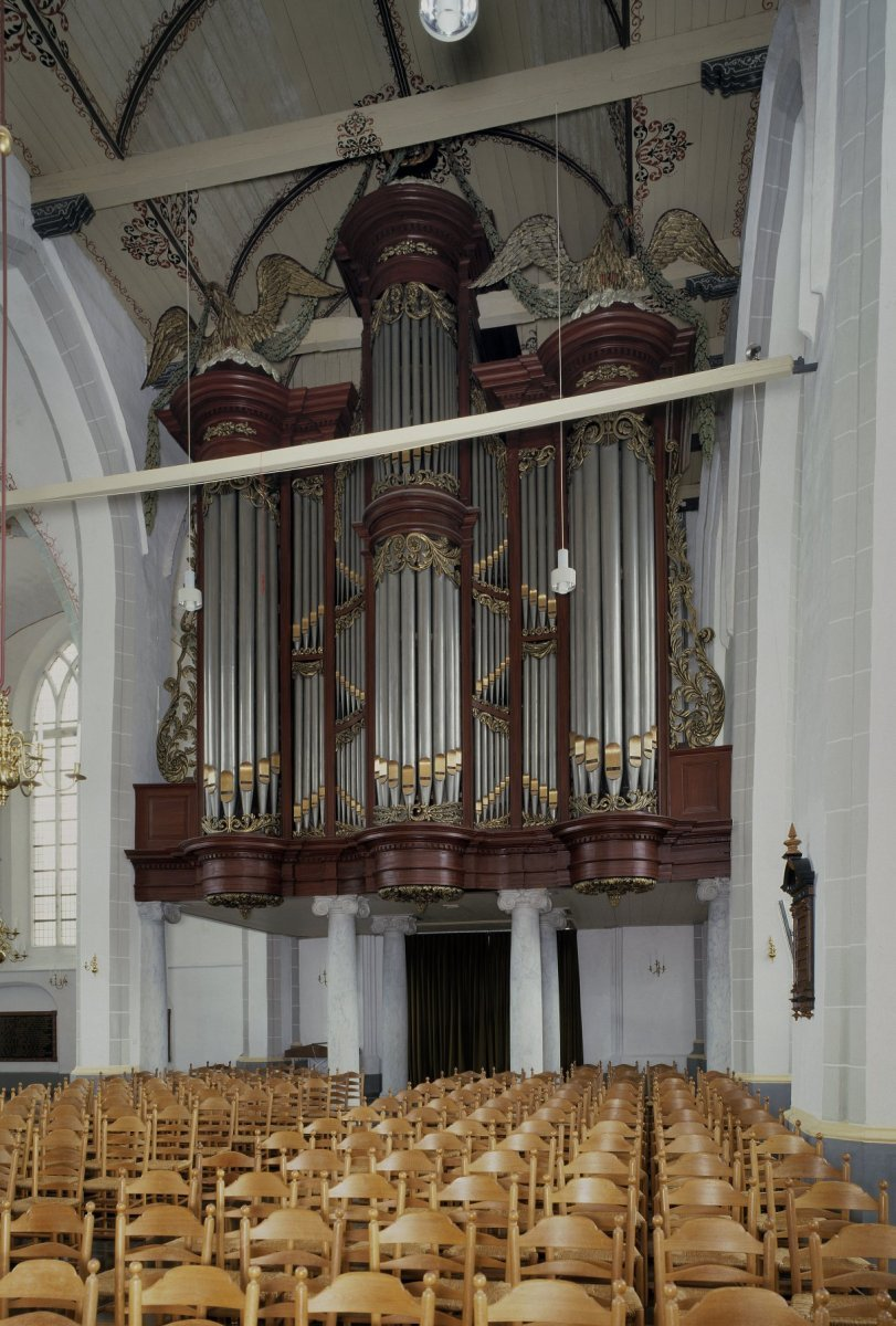 Hervormde Grote kerk: Interieur, aanzicht orgel, orgelnummer 1404 (opmerking: Gefotografeerd voor Het Historische Orgel in Nederland 1858-1865)